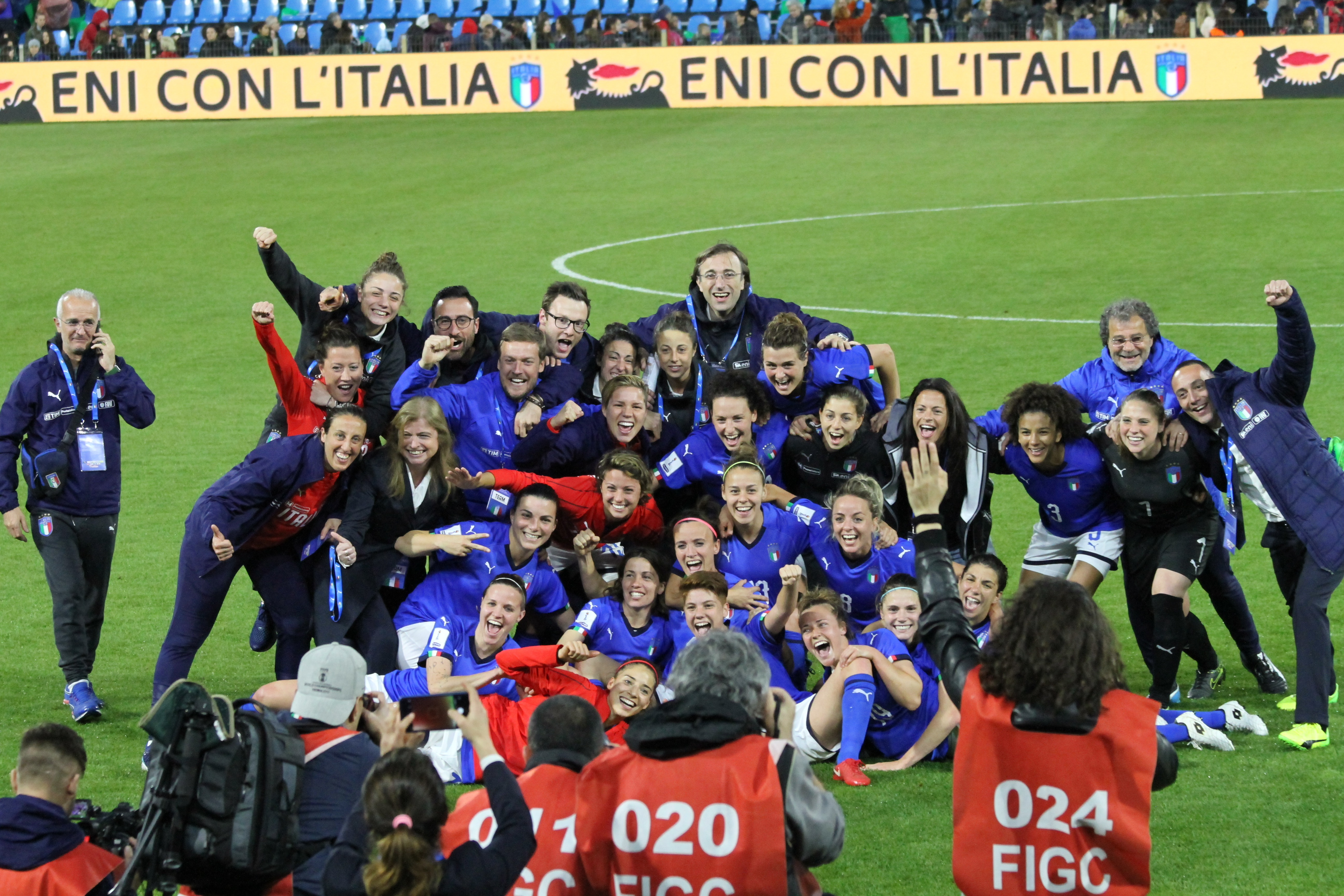 Ferrara, 10 aprile 2018: Italia vs Belgio, qualificazioni al Mondiale di Francia 2019, festeggiamento della nazionale italiana a fine partita.